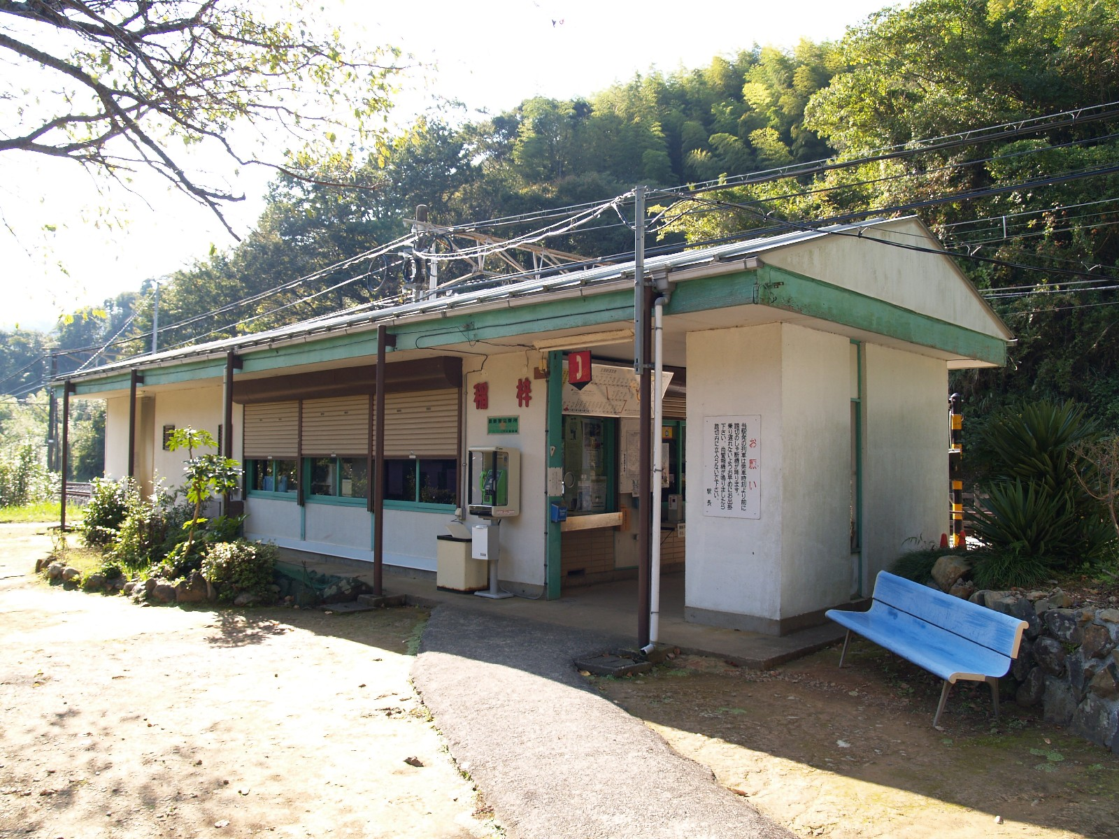 稲梓駅